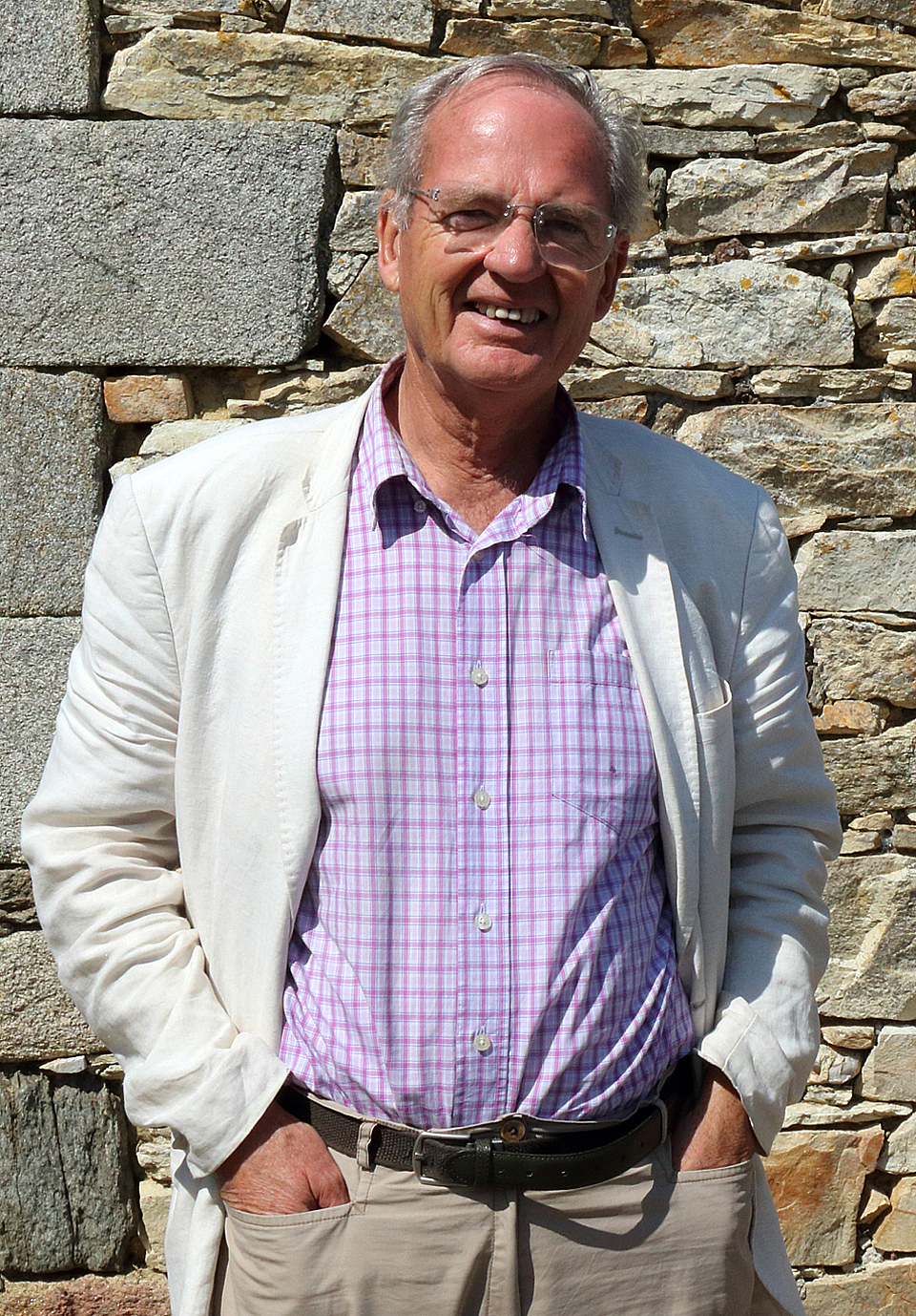 Serge Duigou, historien de la Bretagne et du Pays bigouden, fondateur de la revue Cap Caval; rédacteur en chef adjoint.